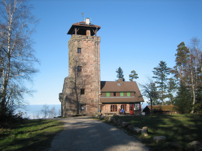 Teufelsmühle oberhalb Loffenau